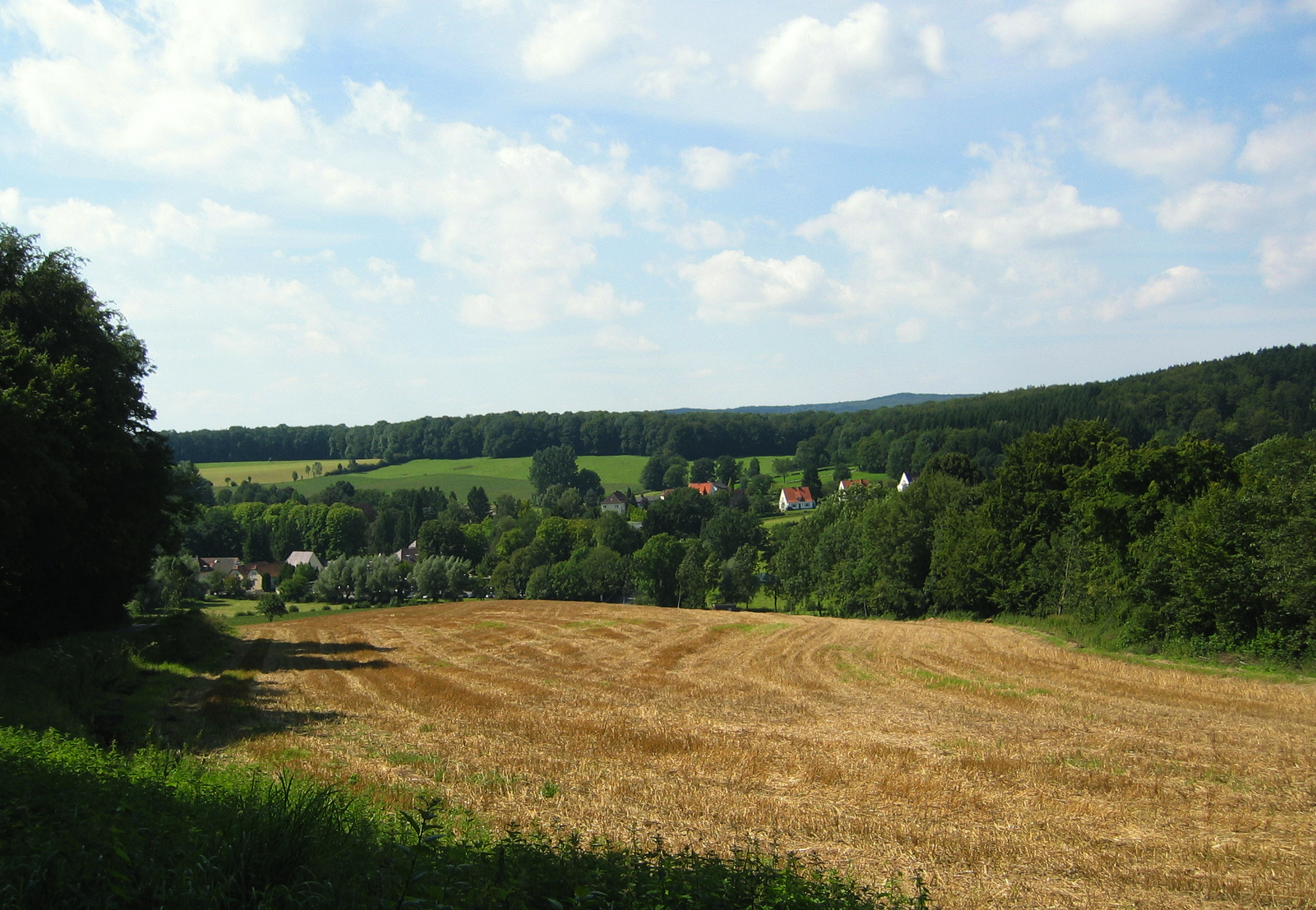 Blick von Nordosten auf (Bad) Hermannsborn, Pömbsen, Bad Driburg, Deutschland.